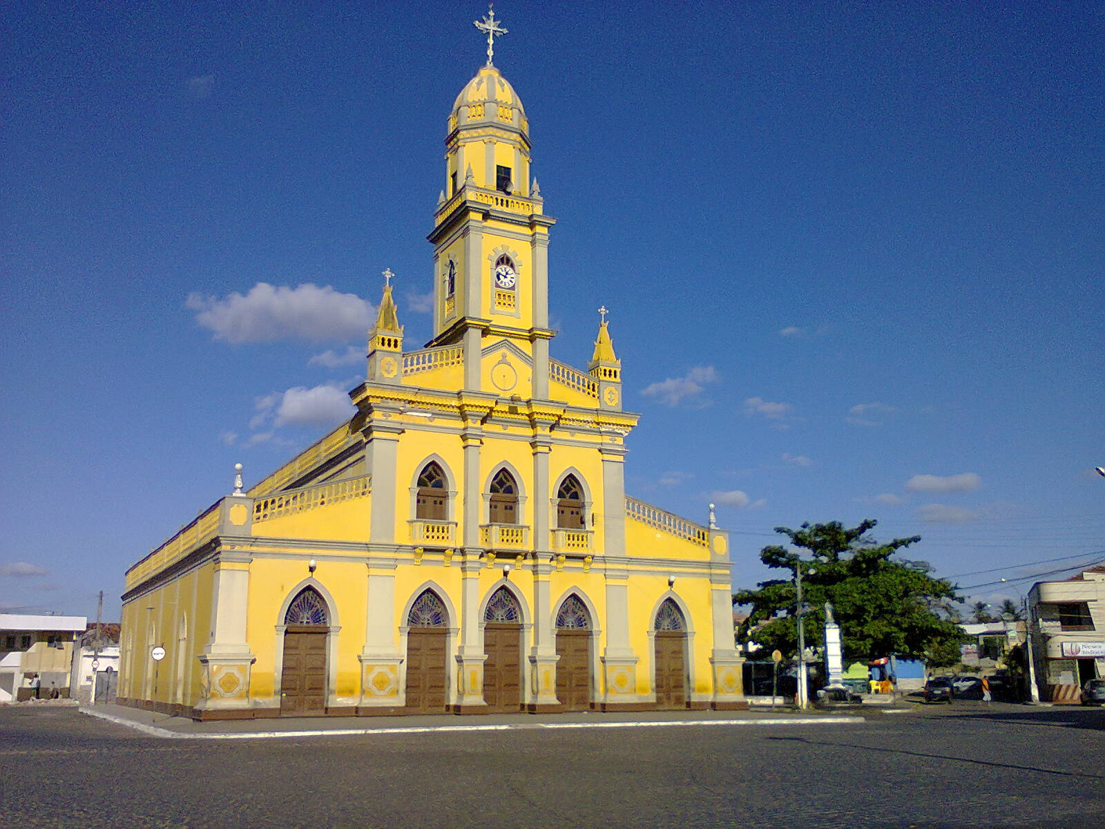 Igreja católica Matriz do município de Itabaiana, estado da Paraíba, Brasil